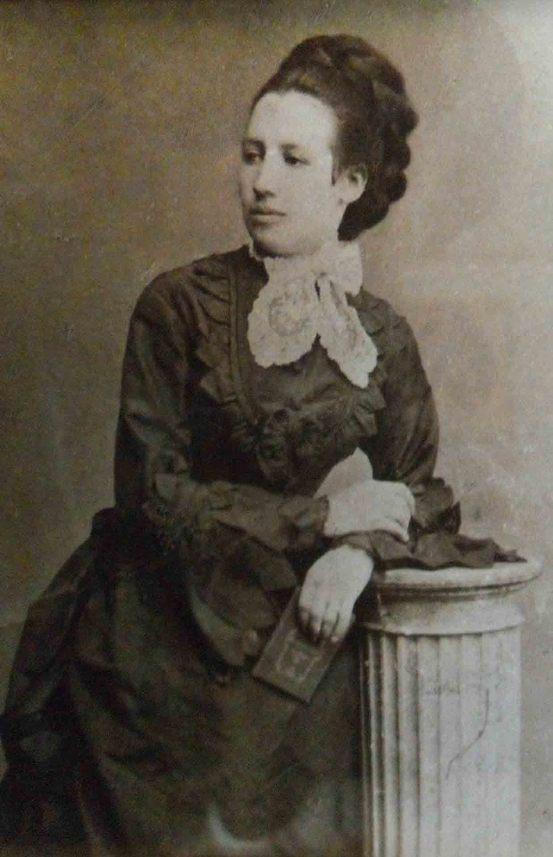 Besenyői és velikei Skublics Jenőné Spelletich Paulina Magdolna Etelka (Szabadka, 1848. május 12. – Zalaegerszeg, 1914. április 3.)